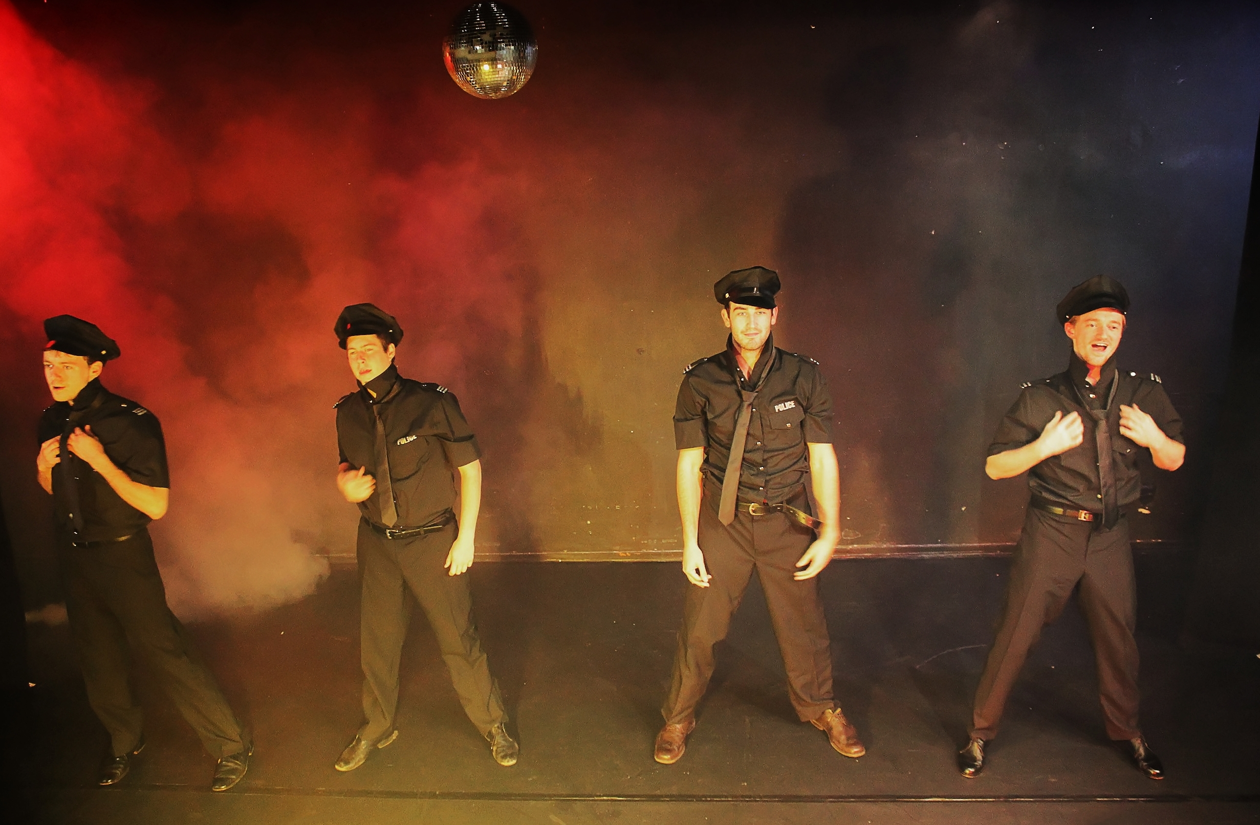 Szene aus einer Aufführung der Männer-Striptease-Komödie Ladies’ Night von Stephen Sinclair und Anthony McCarten unter der Regie von René Wedeward an der Studiobühne Siegburg (Lehrbühne der Schauspielschule Siegburg) in Siegburg in Nordrhein-Westfalen (Deutschland); hier bei der Aufführung vom 17. September 2013.